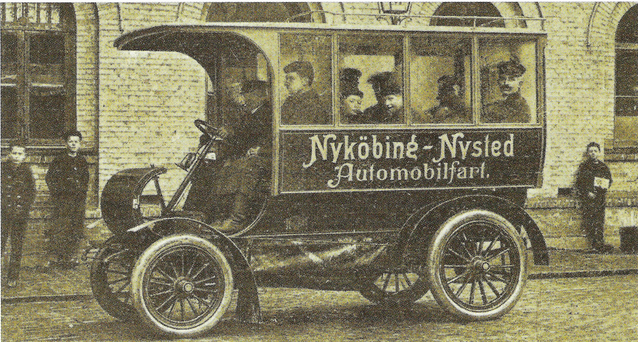 Danmarks første rutebil/the first bus 1903.